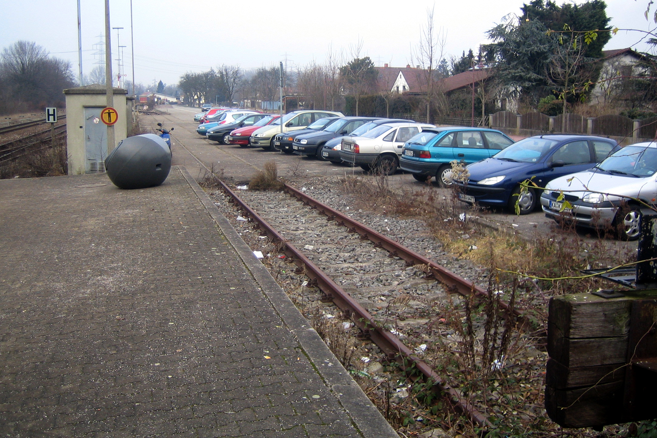 stillgelegtes Gütergleis im Bahnhof Philippsburg, selbst fotografiert